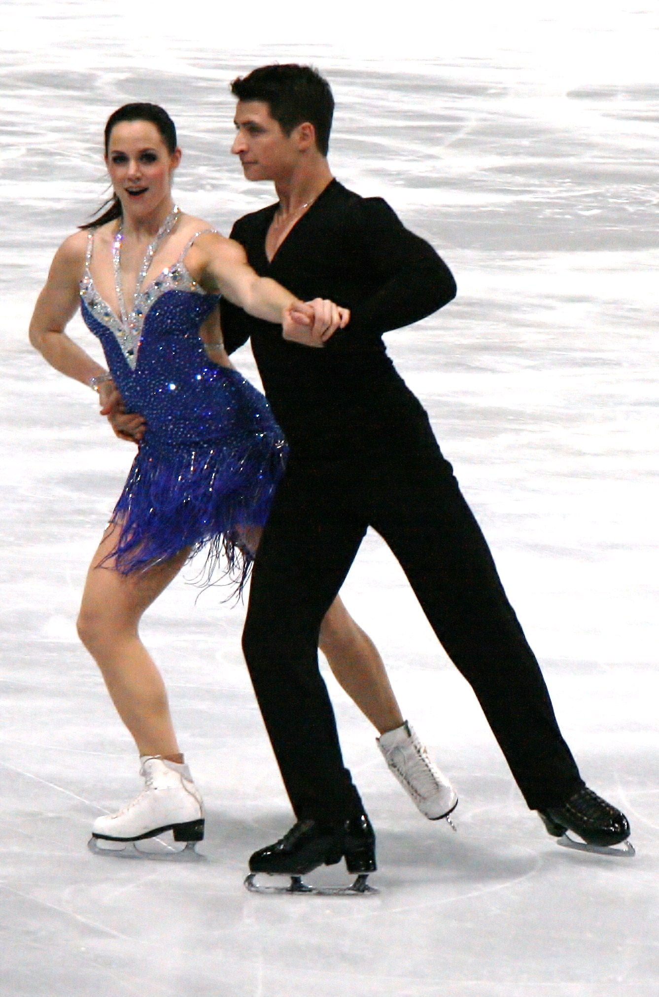 Тесса Виртью и Скотт Моир на 2011 Trophée Eric Bompard